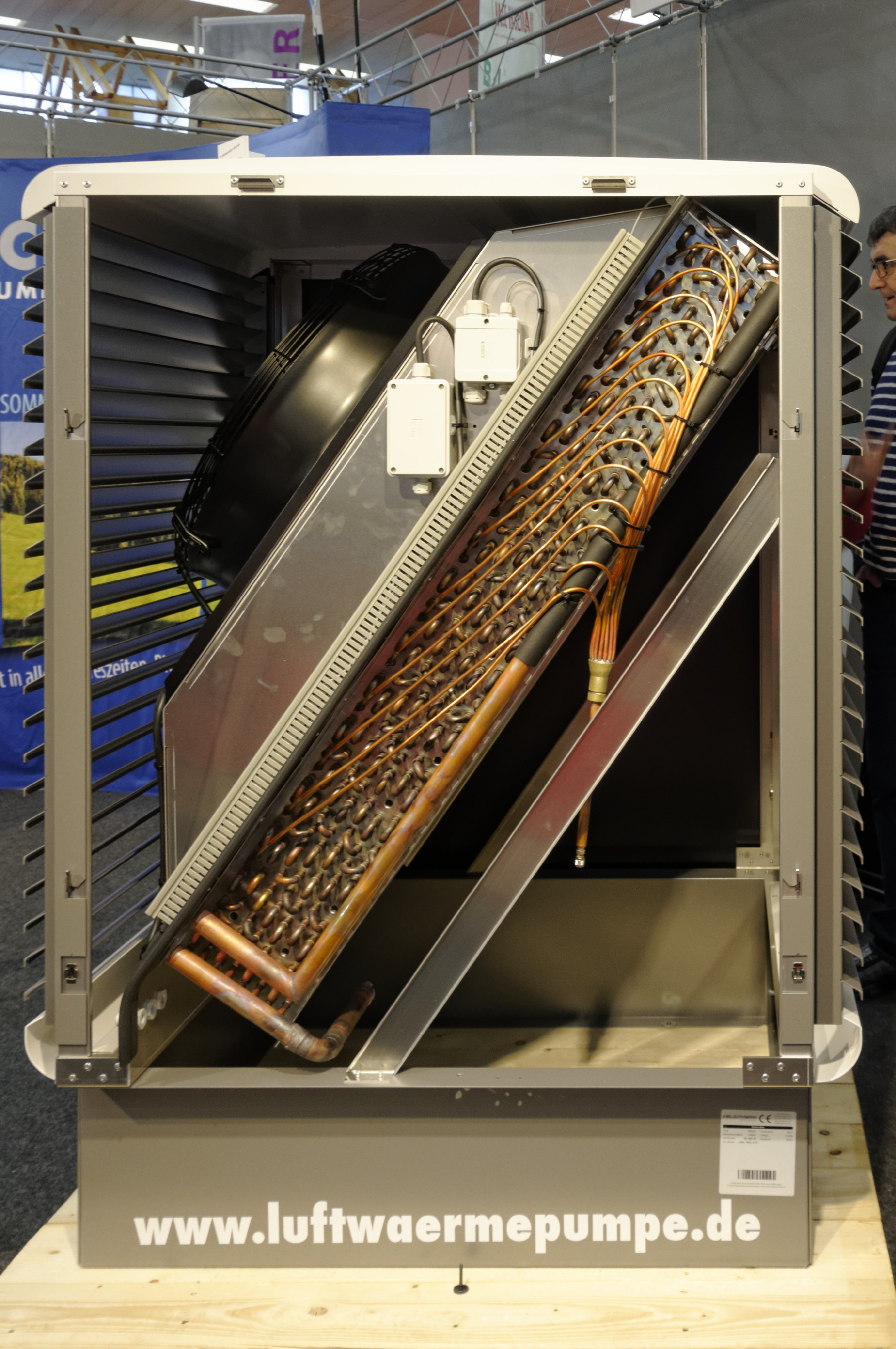 Sindelfingen Haus & Energie 2018